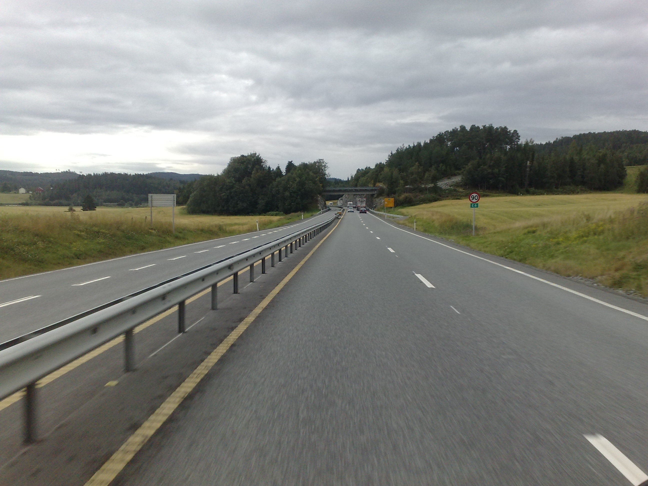 høyhastighetsveg, E6 bygget som motorvei et sted på Østlandet